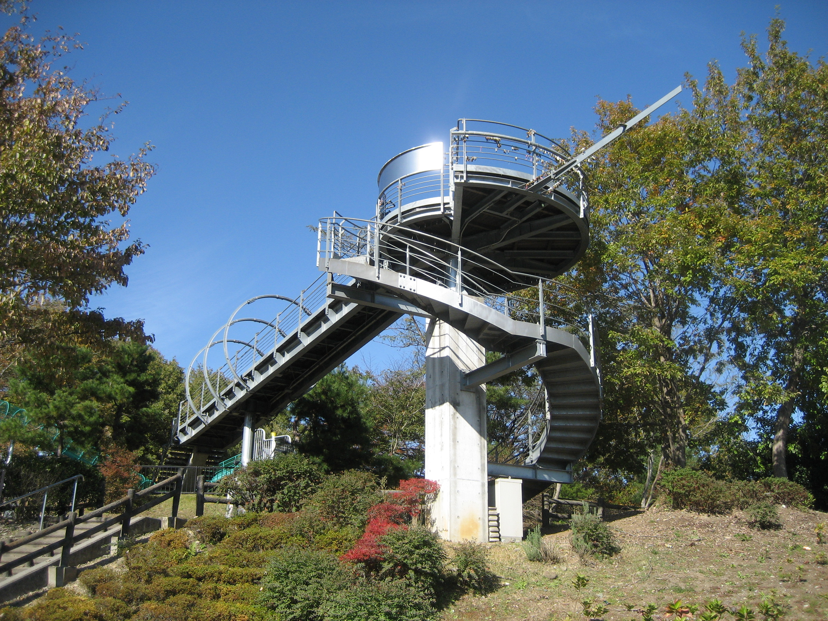 秩父ミューズパーク内にある旅立ちの丘